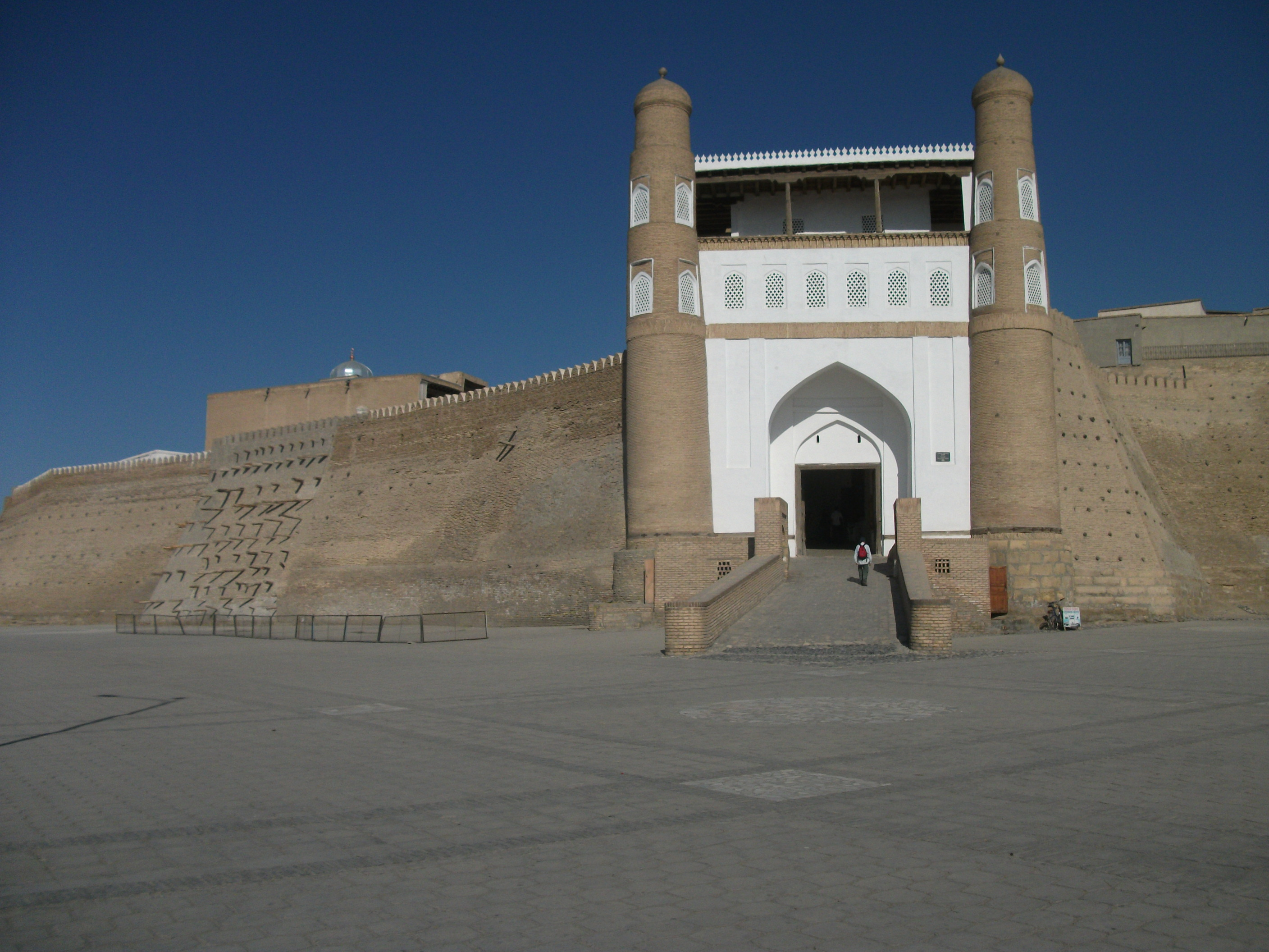 Ворота Арка, Бухара